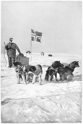 Aan de Zuidpool